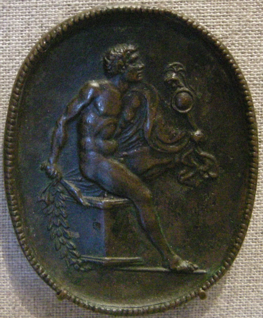 Artista fiorentino, dall'antico, diomede e il palladio, fine XV-inizio XVI sec.